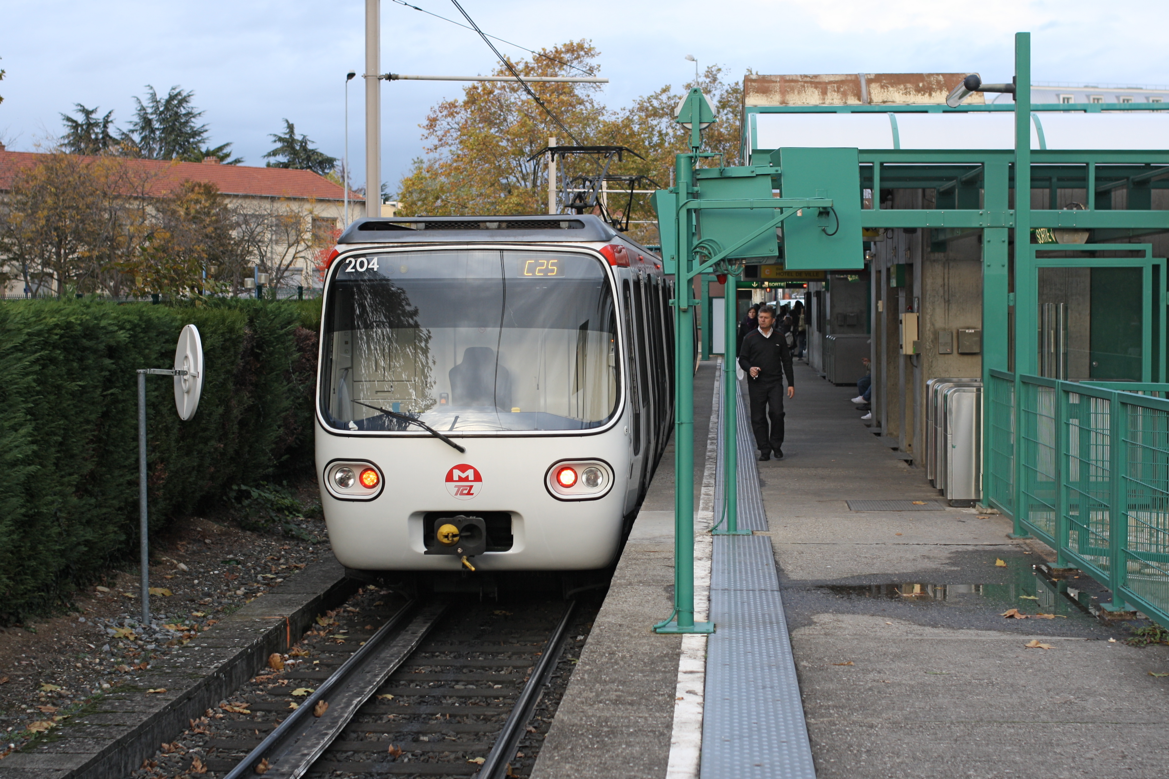 Terminus Cuire à Lyon